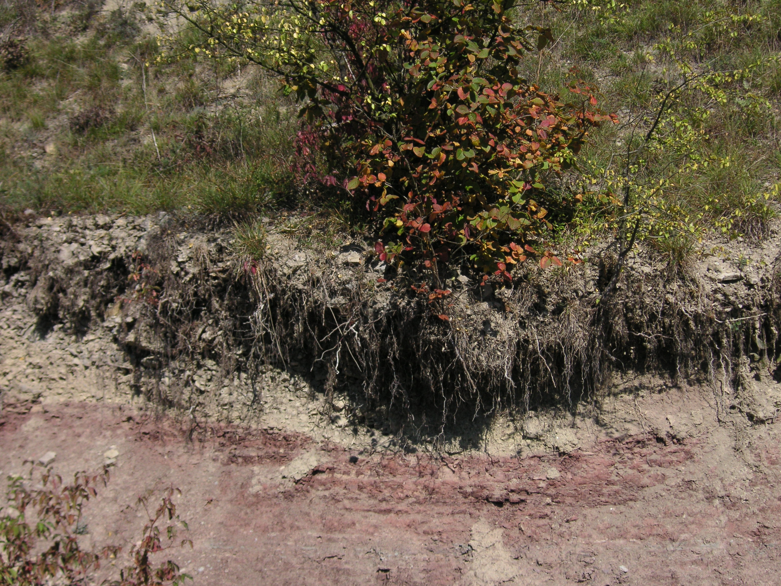 NSG Grainberg-Kalbenstein und Saupurzel - Aufschluss durch Weinbergsweg, zeigt Überlagerung des Sandsteins durch das hier nur noch dünne Kalkgestein